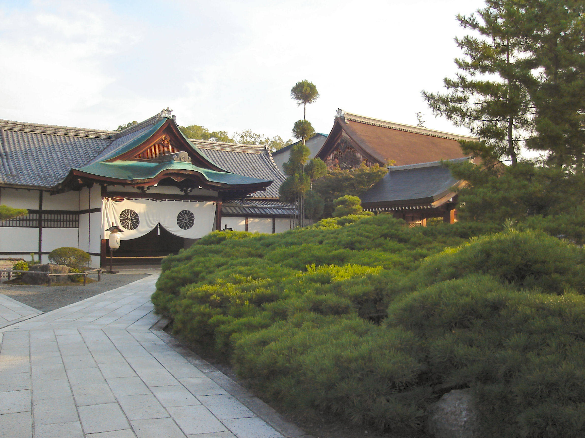 Daigakuji